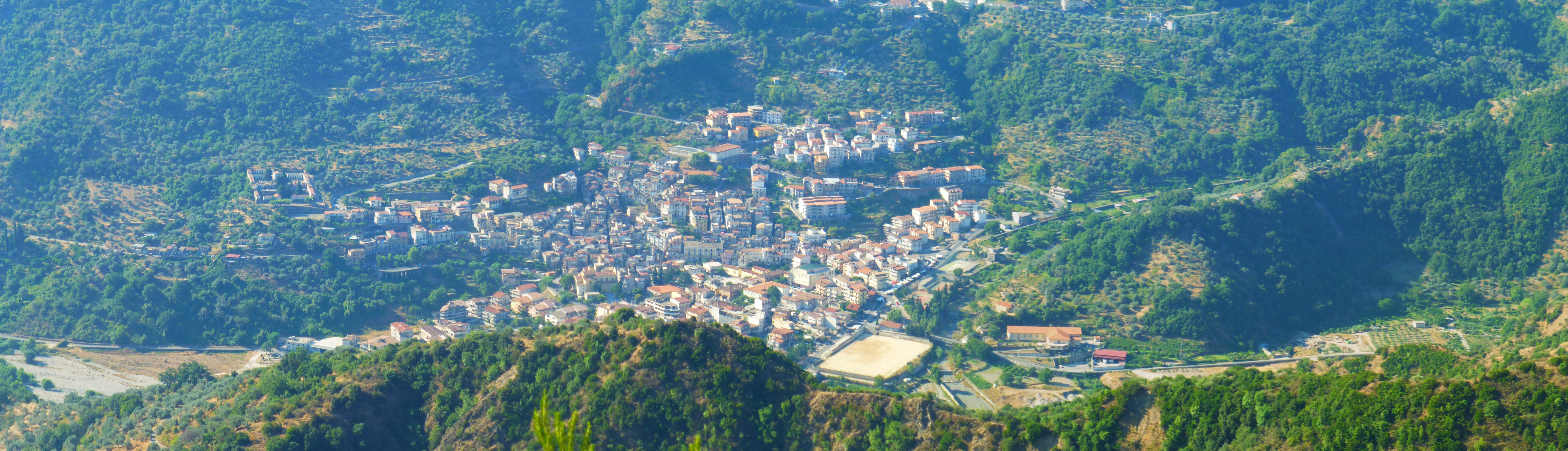 Panorama di Bivongi da località Gotieri